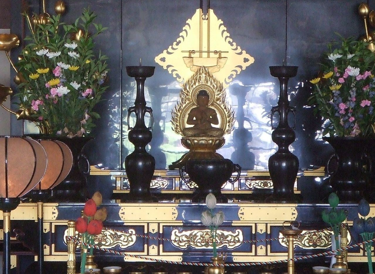 南光坊の本堂厨子前のお前立ち